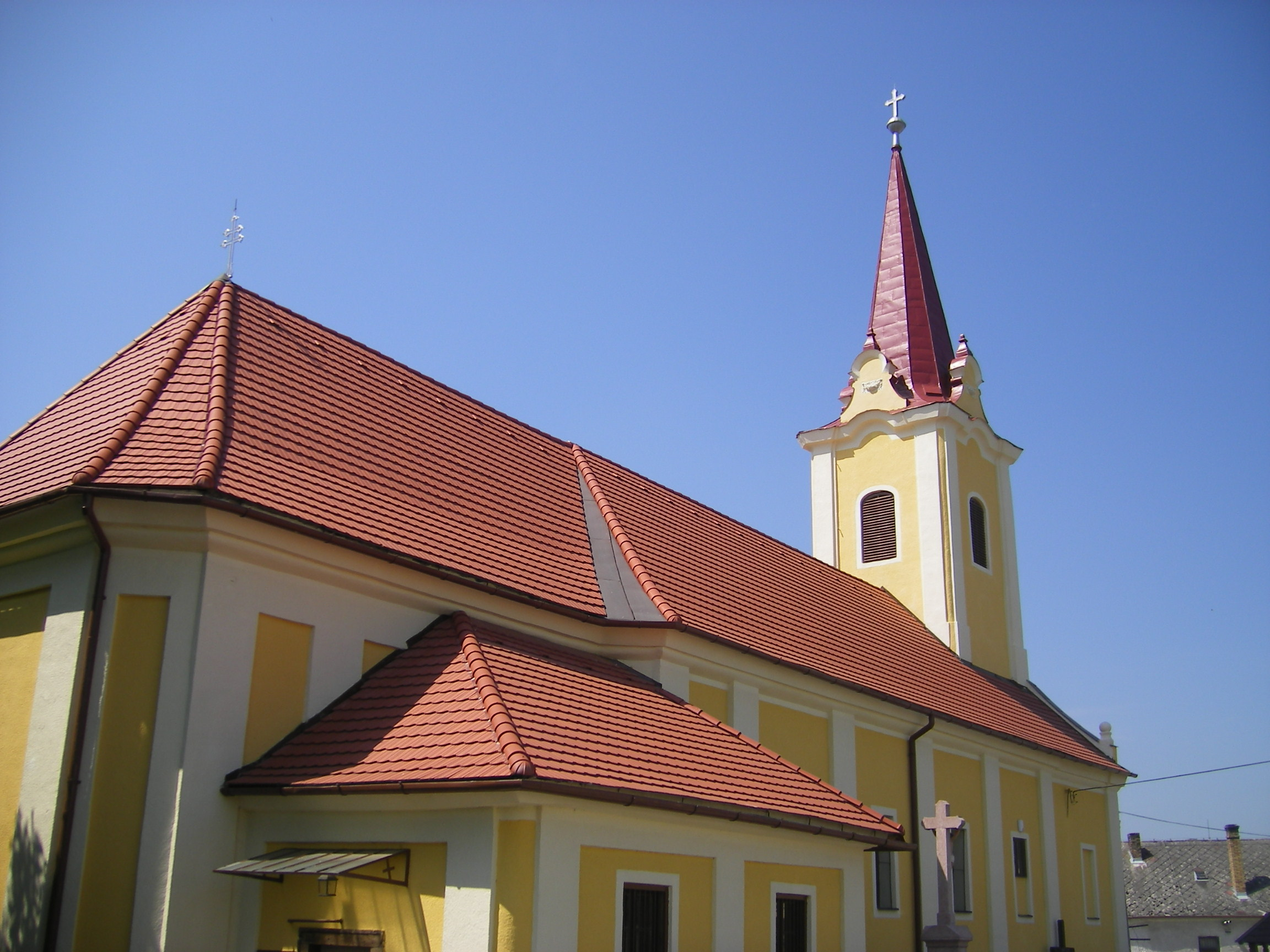 Komáromszentpéter - Katolikus templom